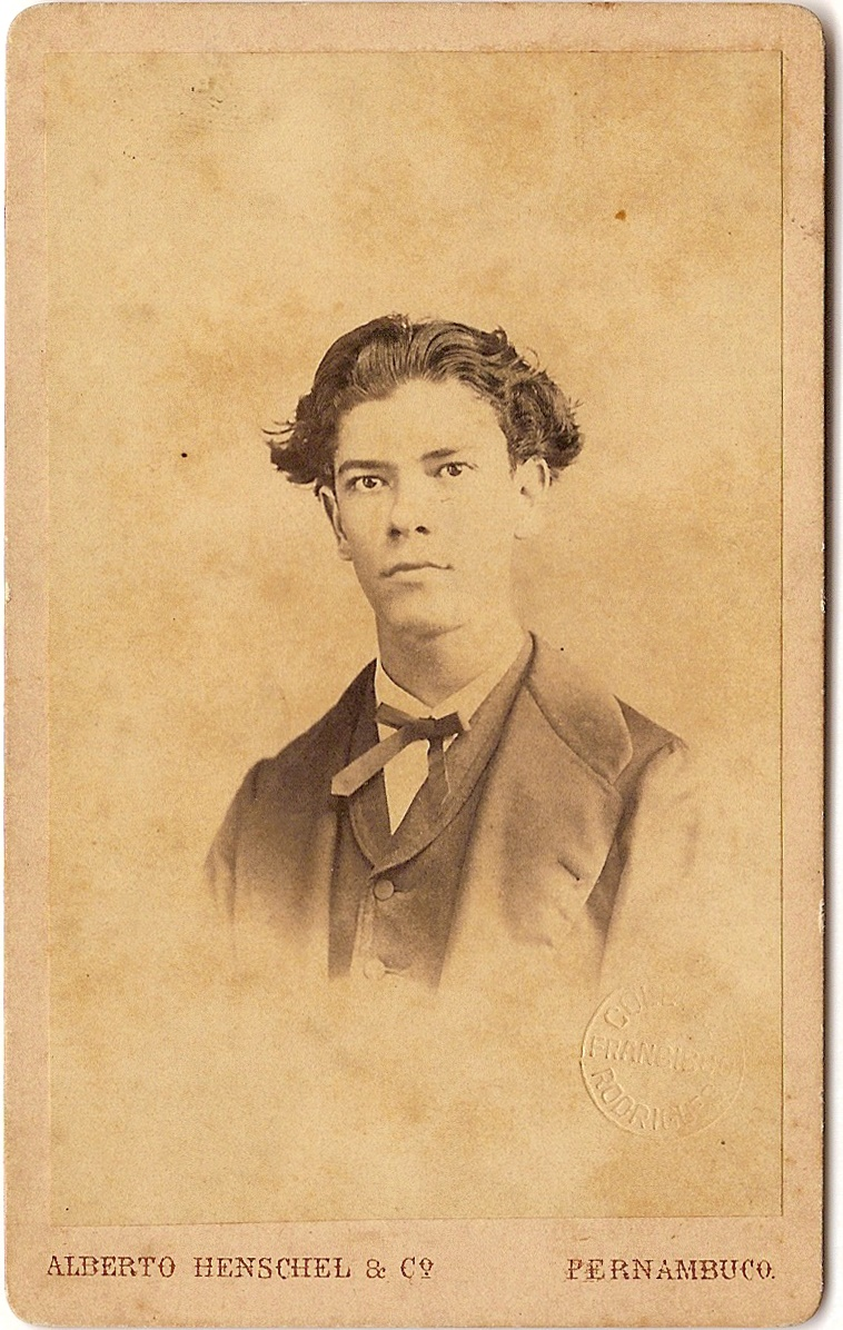 Herculano Bandeira de Mello, bacharel em 1870, deputado provincial, senador estadual, magistrado , governador de Pernambuco [Engenho Criméia, Nazaré da Mata, PE]. (Col. Francisco Rodrigues; FR-3273).